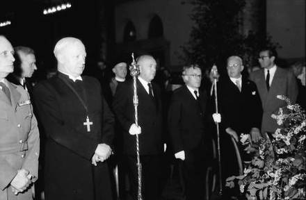 500 Jahre Universität Freiburg: Ehrengäste mit Landesbischof Bender